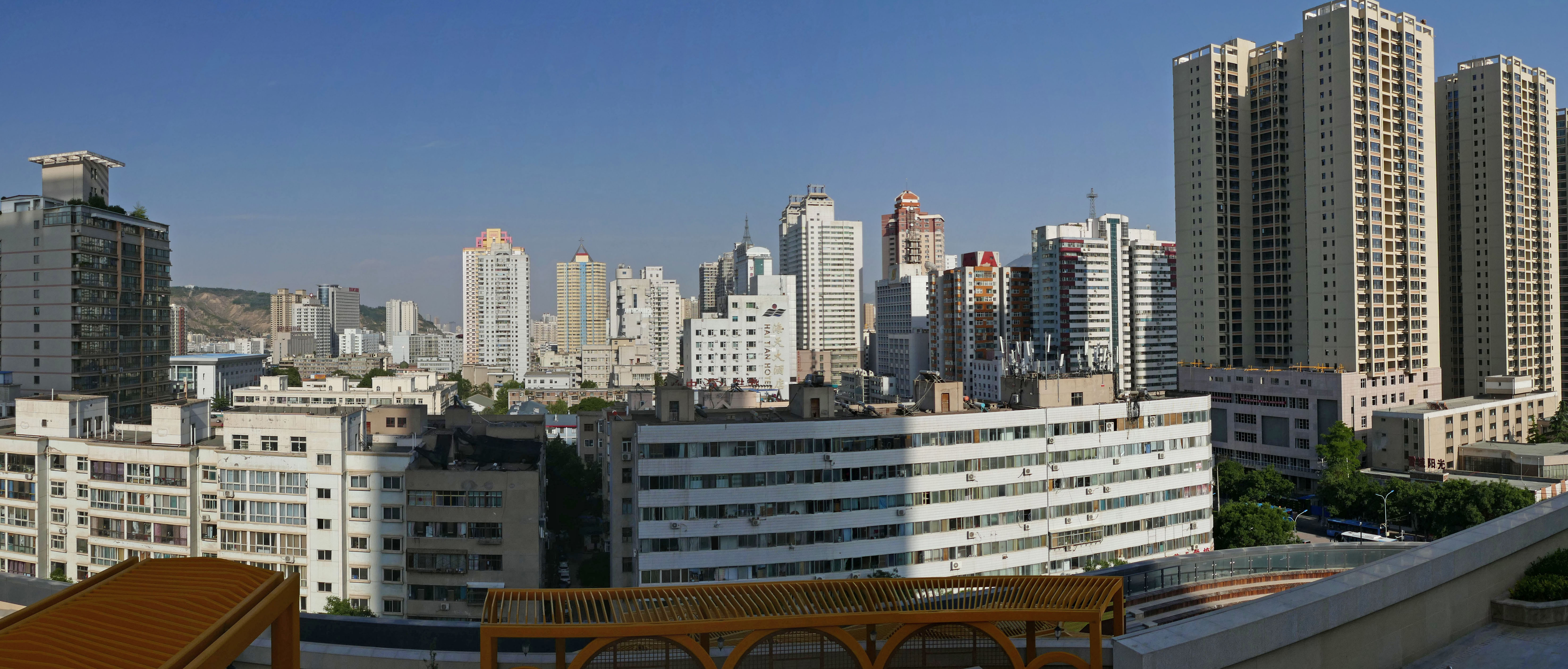 七里河区从兰州中心西看的景色